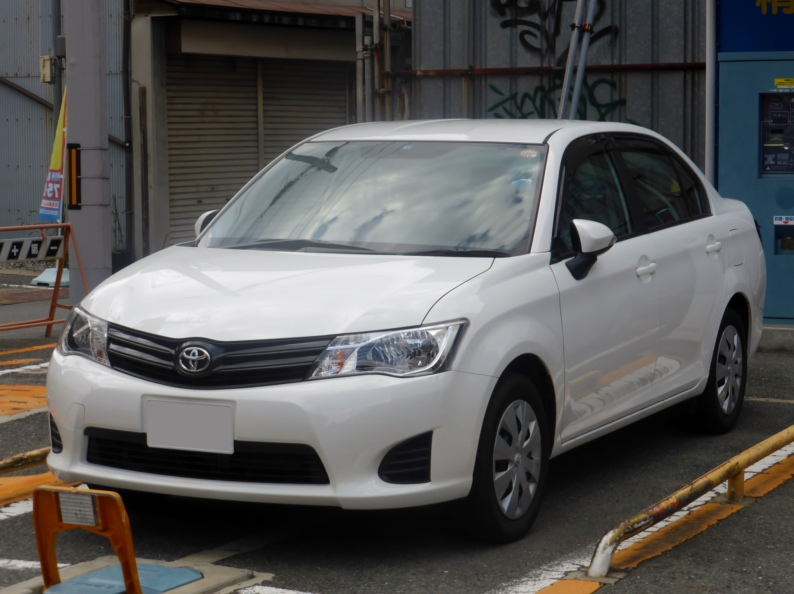 E160型トヨタ・カローラアクシオをフロントから撮影。営業所の車両なのかフロントがNCVロゴではなくトヨタのエンブレムとなっている。